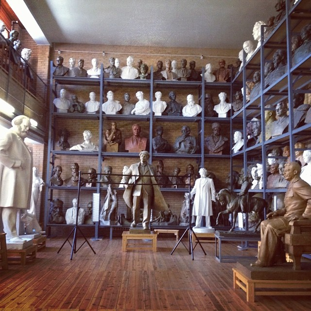 В музее находятся скульптуры из гипса, глины и бронзы, это творческие и политические деятели Беларуси и России, философы и поэты древности, известные люди 2ой мировой войны.